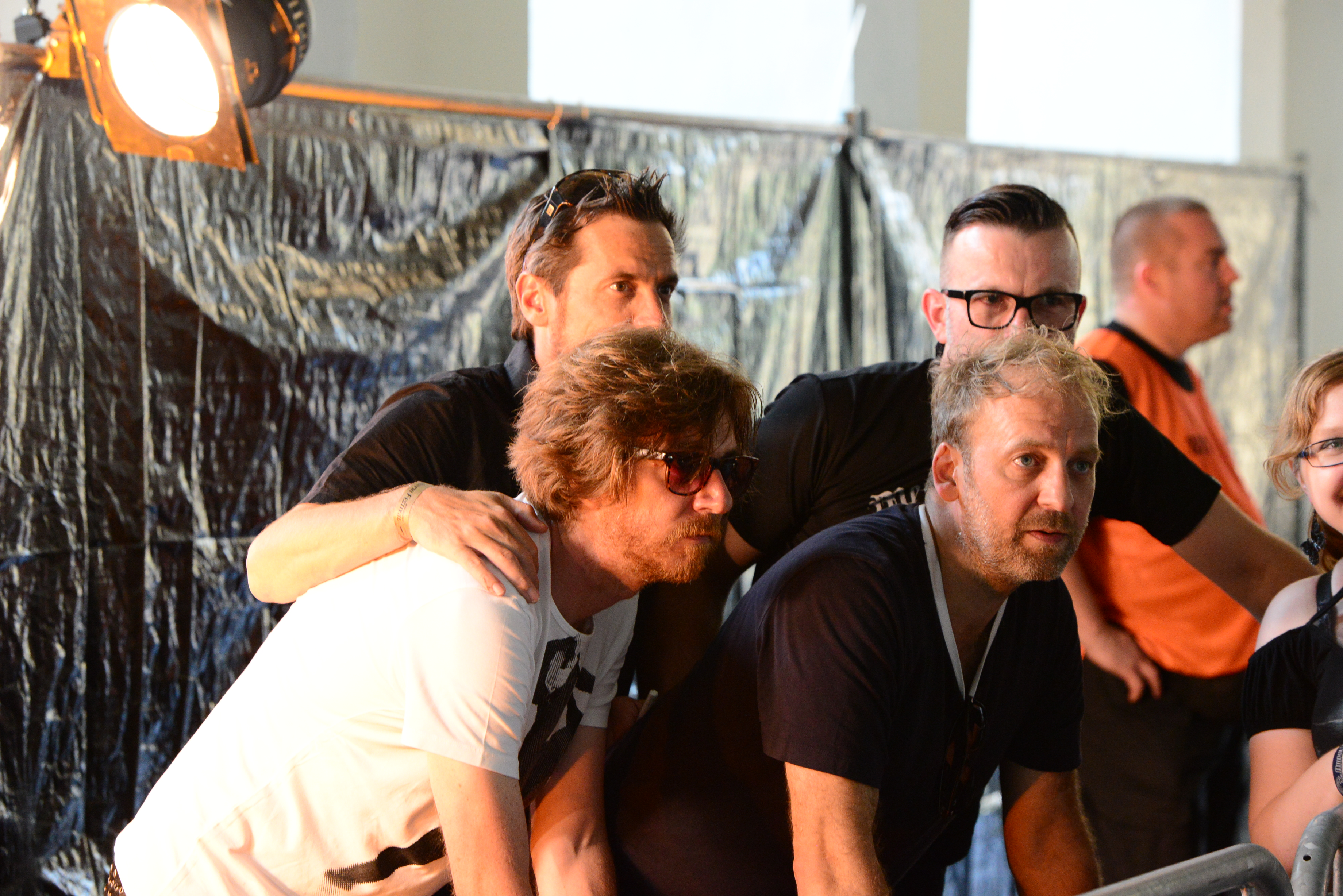 Signing sessions: Camouflage, Amphi festival 2014